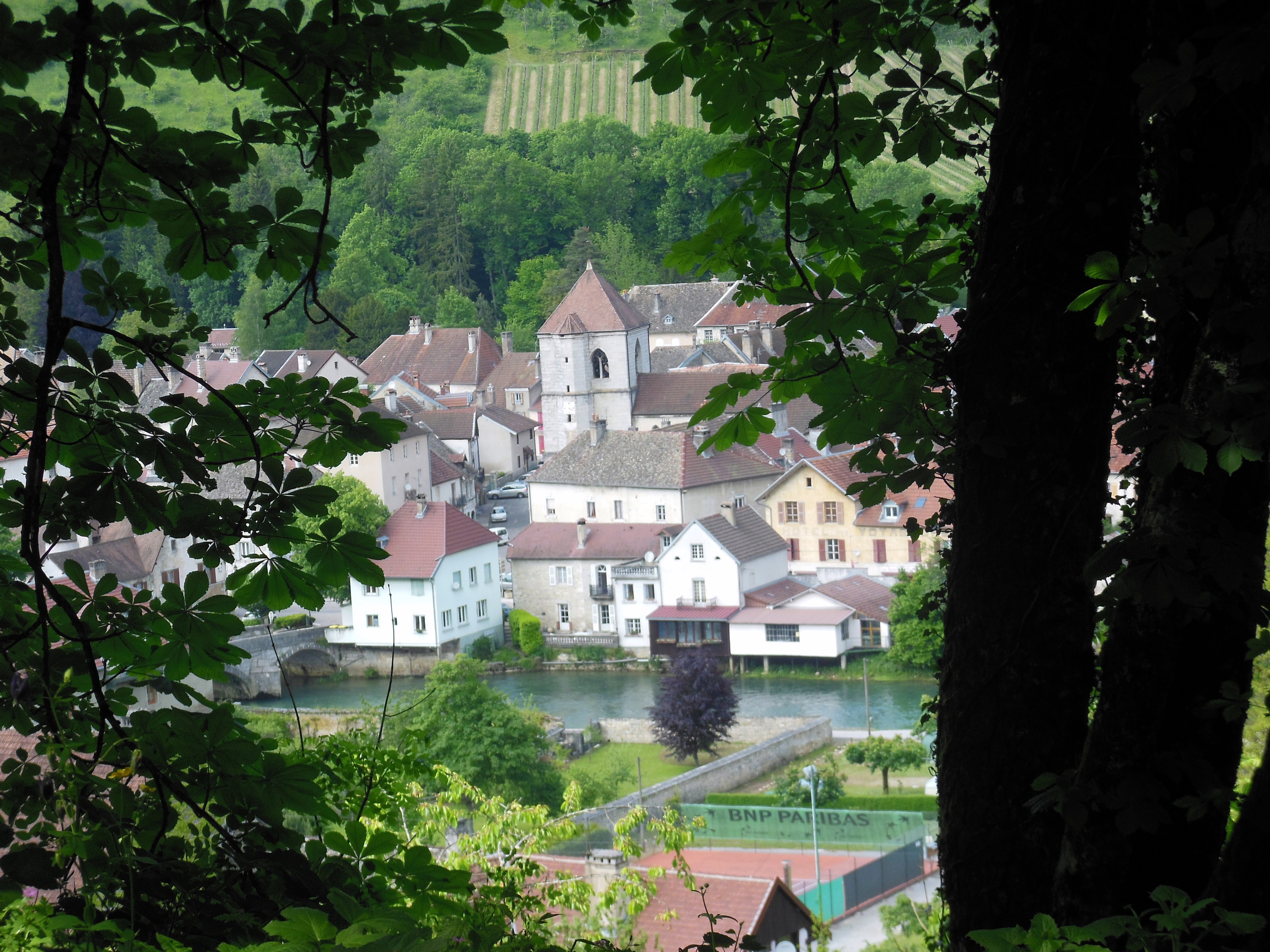 Vue de Vuillafans, depuis la commune voisine de Châteauvieux-les-Fossés.